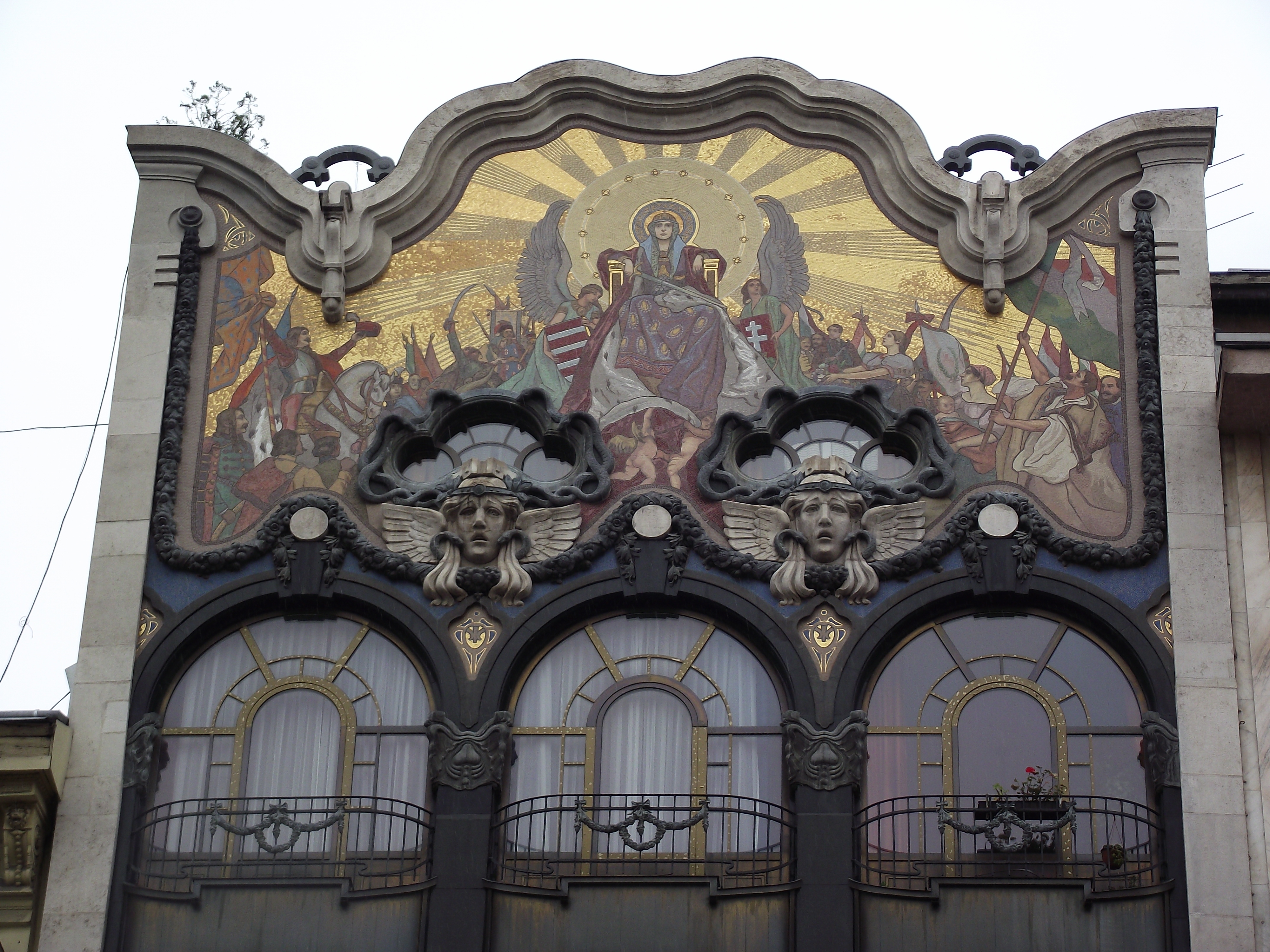 Török bankház